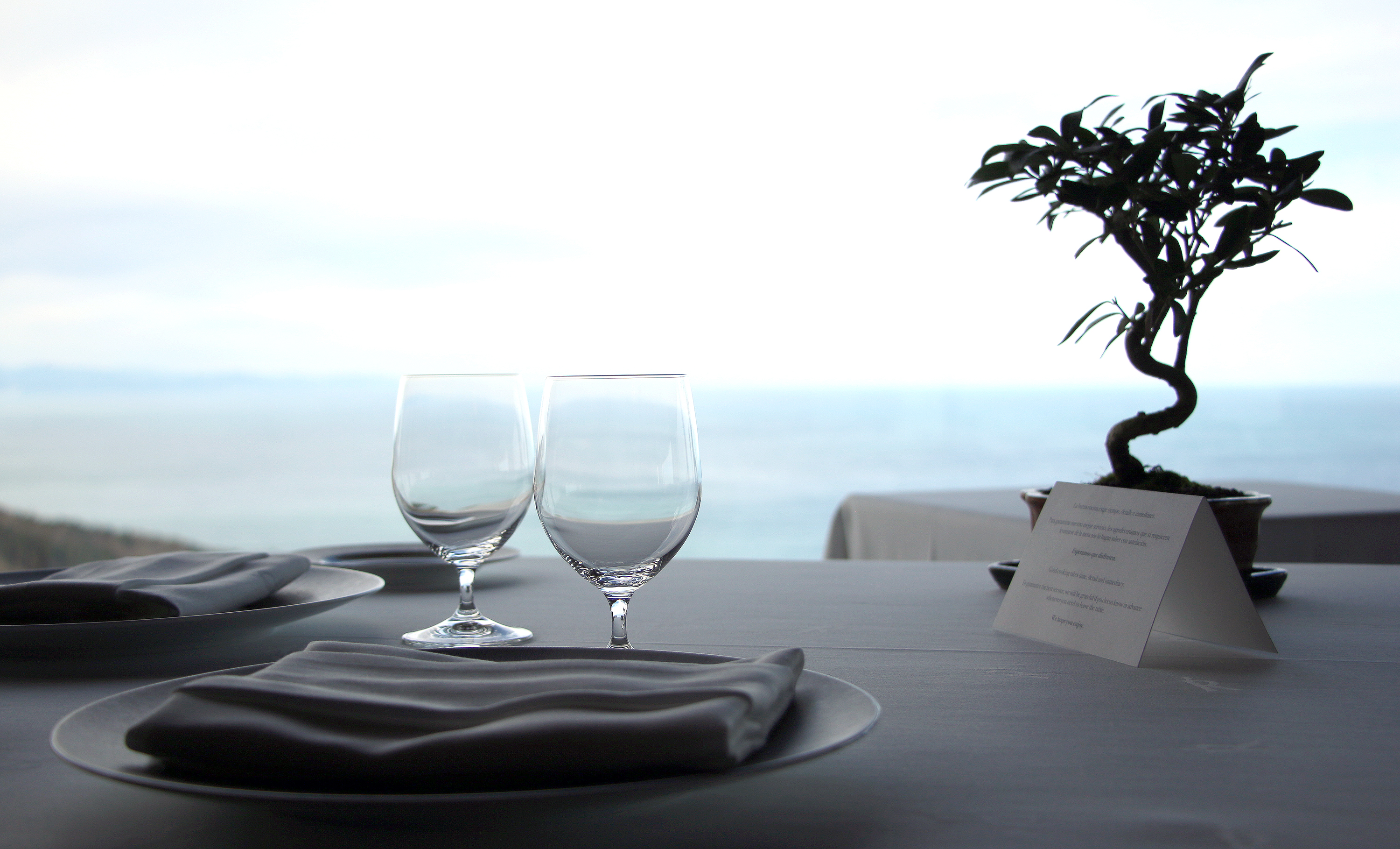 Vista del mar Cantábrico desde el restaurante Akelarre de San Sebastián